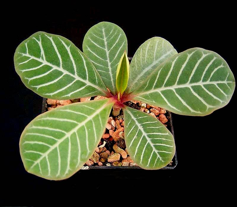 Euphorbia leuconeura